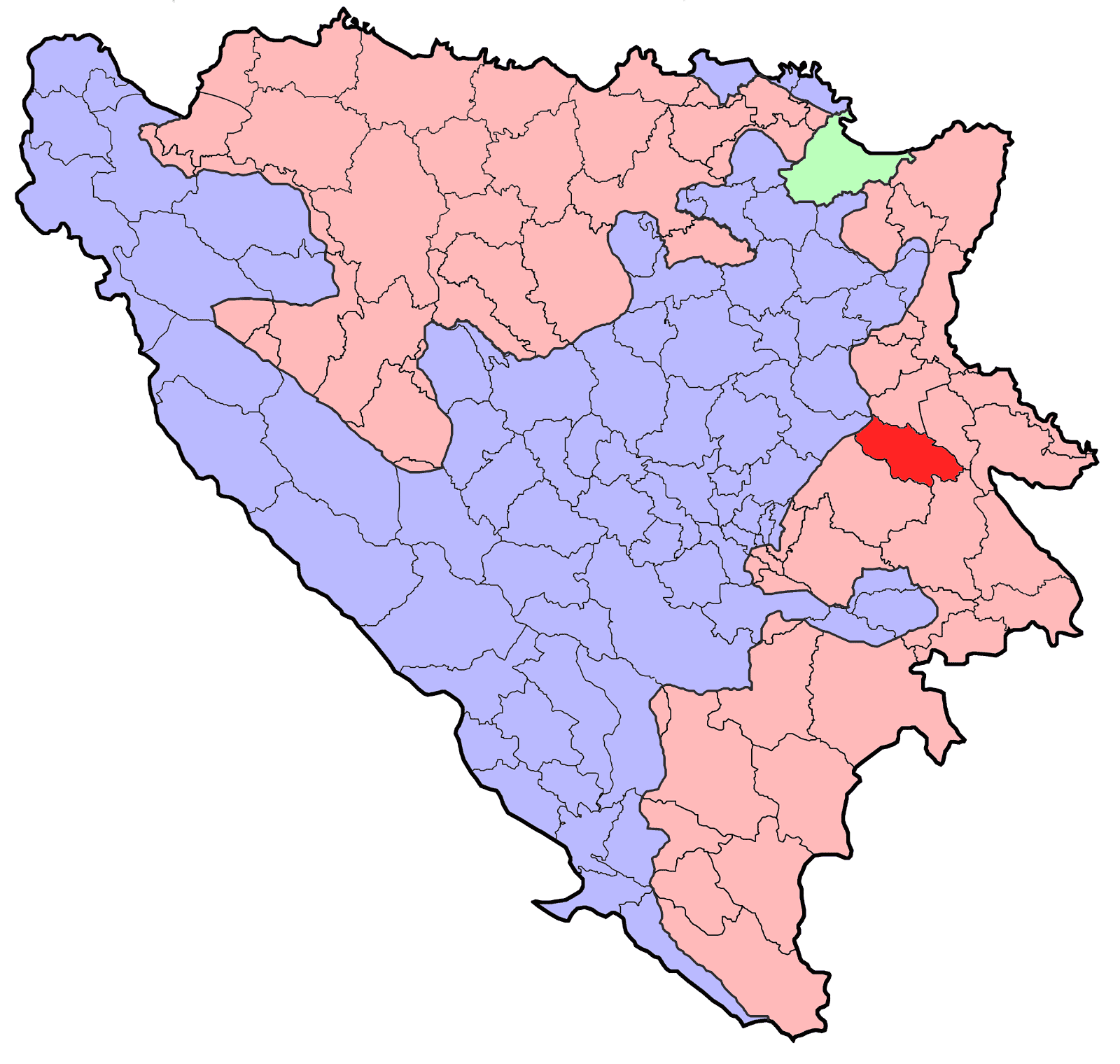 Republika Srpska (BiH) municipality